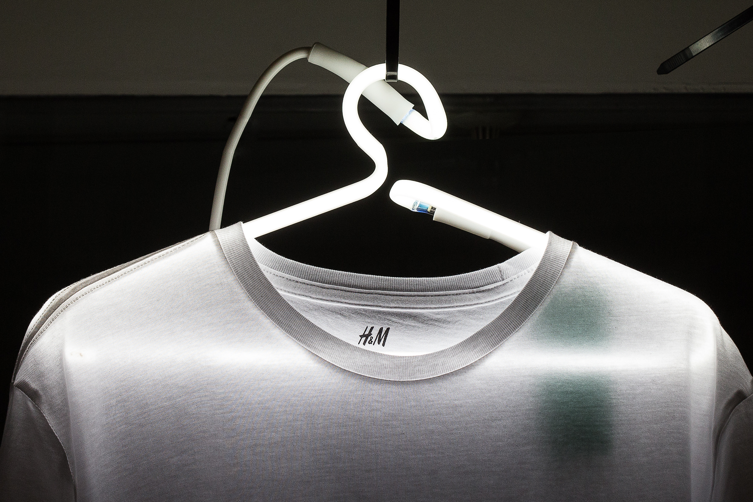 Проект Kickback. Выставка Akkta в галерее Anna Nova, Санкт-Петербург; Россия, 2018